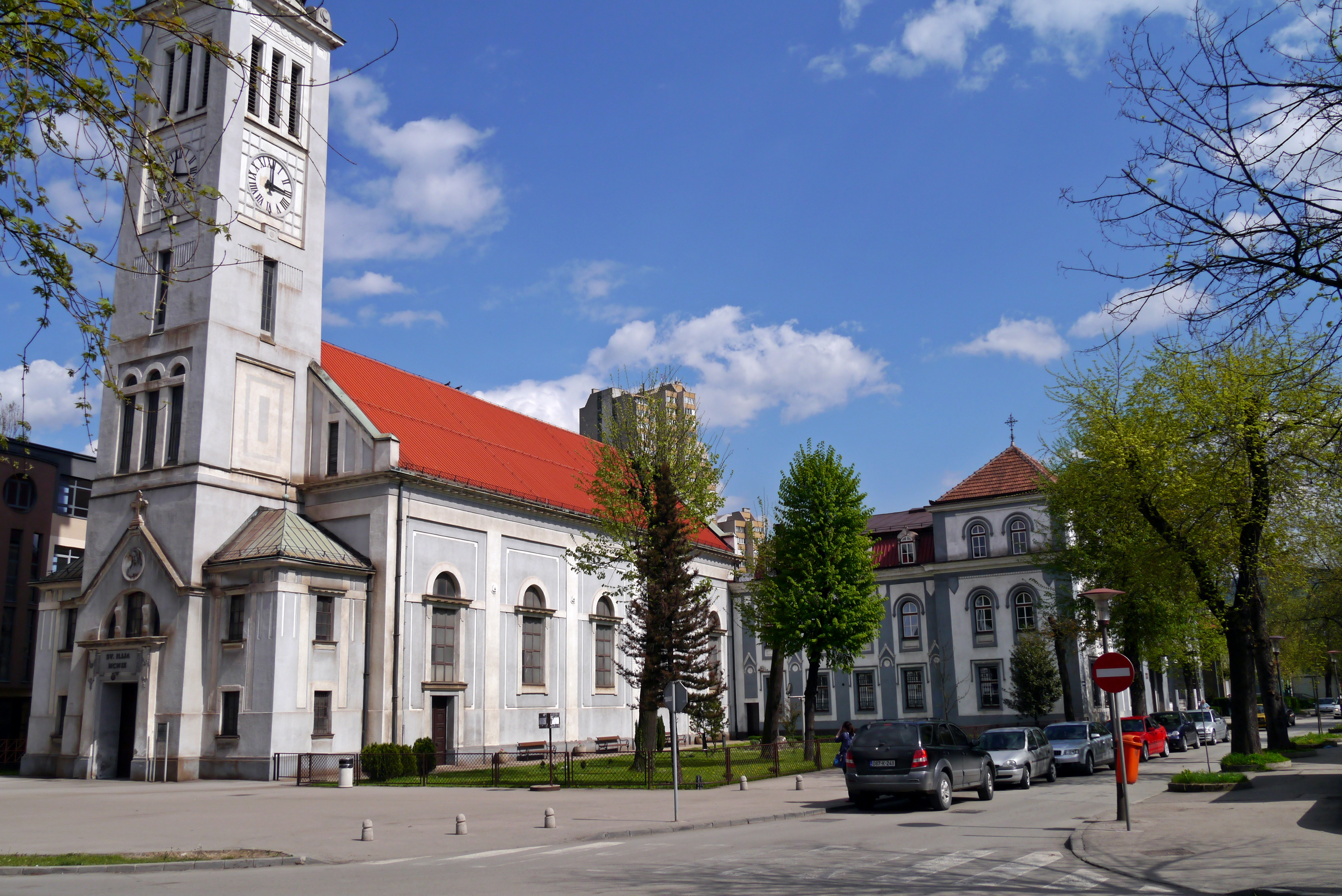 Crkva sv. Ilije, Zenica